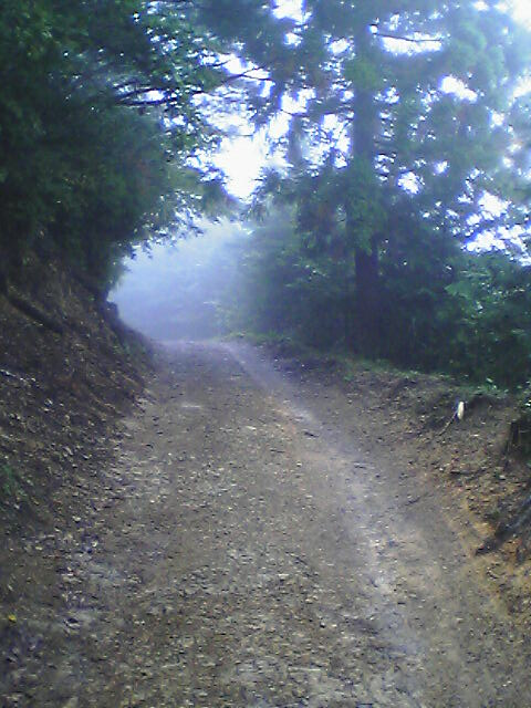 熊野古道小辺路、薄峠（すすきとうげ）付近の尾根道にて、 2005年10月18日撮影。 薄峠は、高野山大滝口女人堂（ろくろ峠）と高野町大滝集落を結ぶ峠道。